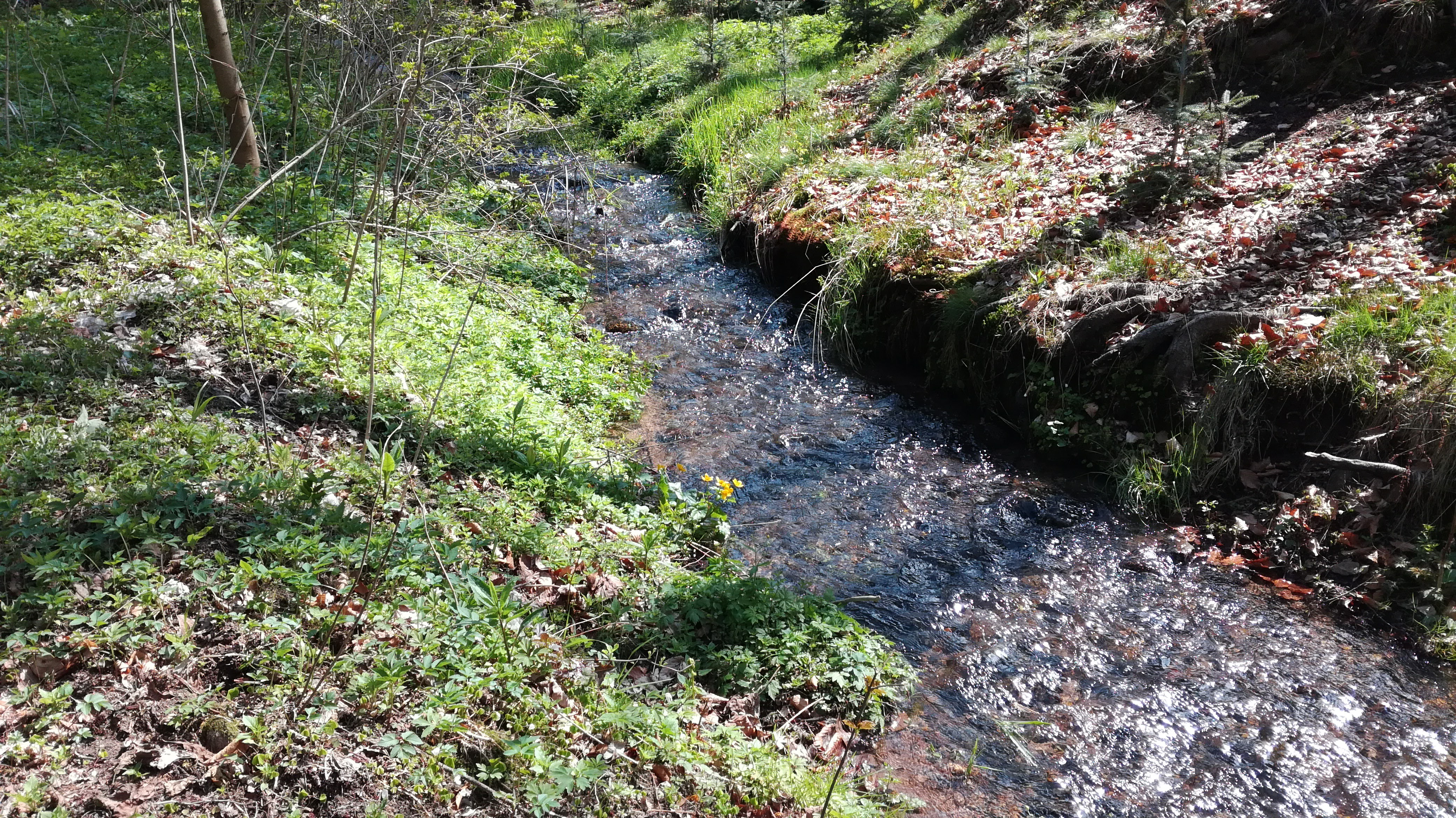 Strouženský potok